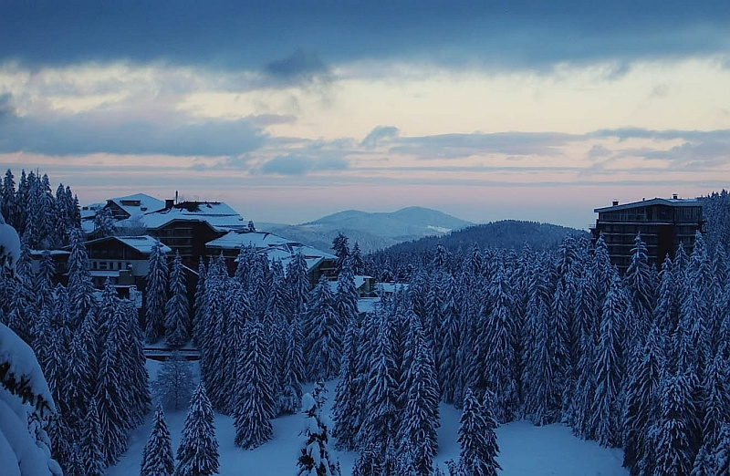 Pamporovo